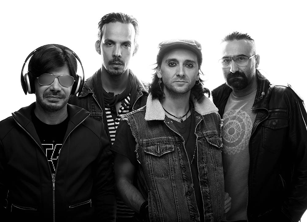 Foto del grupo Gandhi de Costa Rica.